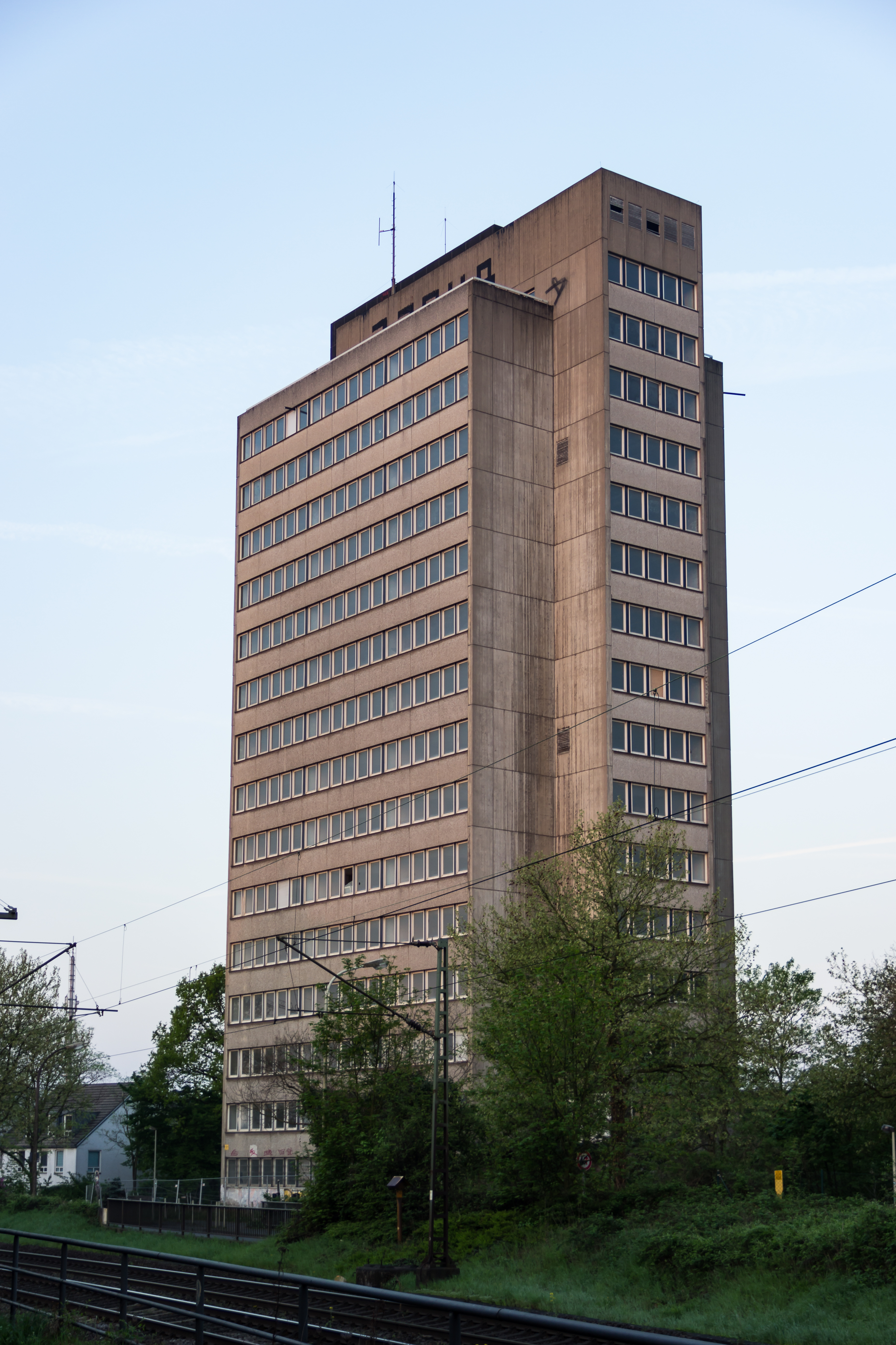 In dem Hochhaus am Platanenweg war von 1973 bis 2001 das Sanitätsamt der Bundeswehr beheimatet.